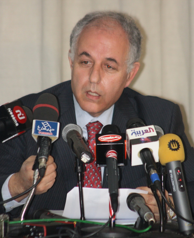 [Mohamed El Hedef] Both Tunisians and foreign donors can contribute to a new development fund, BCT chief Mustapha Kamel Nabli said in Tunis on February 16th. بإمكان المانحين التونسيين والأجانب المساهمة في صندوق جديد للتنمية حسب قول محافظ البنك المركزي التونسي مصطفى كمال النابلي في العاصمة التونسية 16 فبراير Les bailleurs de fonds tunisiens et étrangers peuvent désormais apporter leur contribution à un nouveau fonds de développement, a indiqué, le 16 février à Tunis, le gouverneur de la Banque centrale de Tunisie, Mustapha Kamel Nabli. Full story: القصة L'article: Central Bank of Tunisia governor Mustapha Kamel Nabli at a press conference in Tunis on February 16th, 2011.